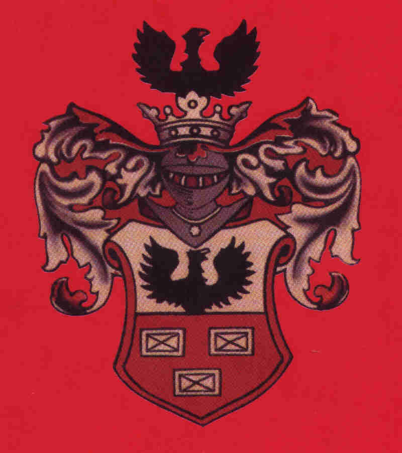 Herb Sulima z Herbarza Kaspra Niesieckiego z 1740 r.